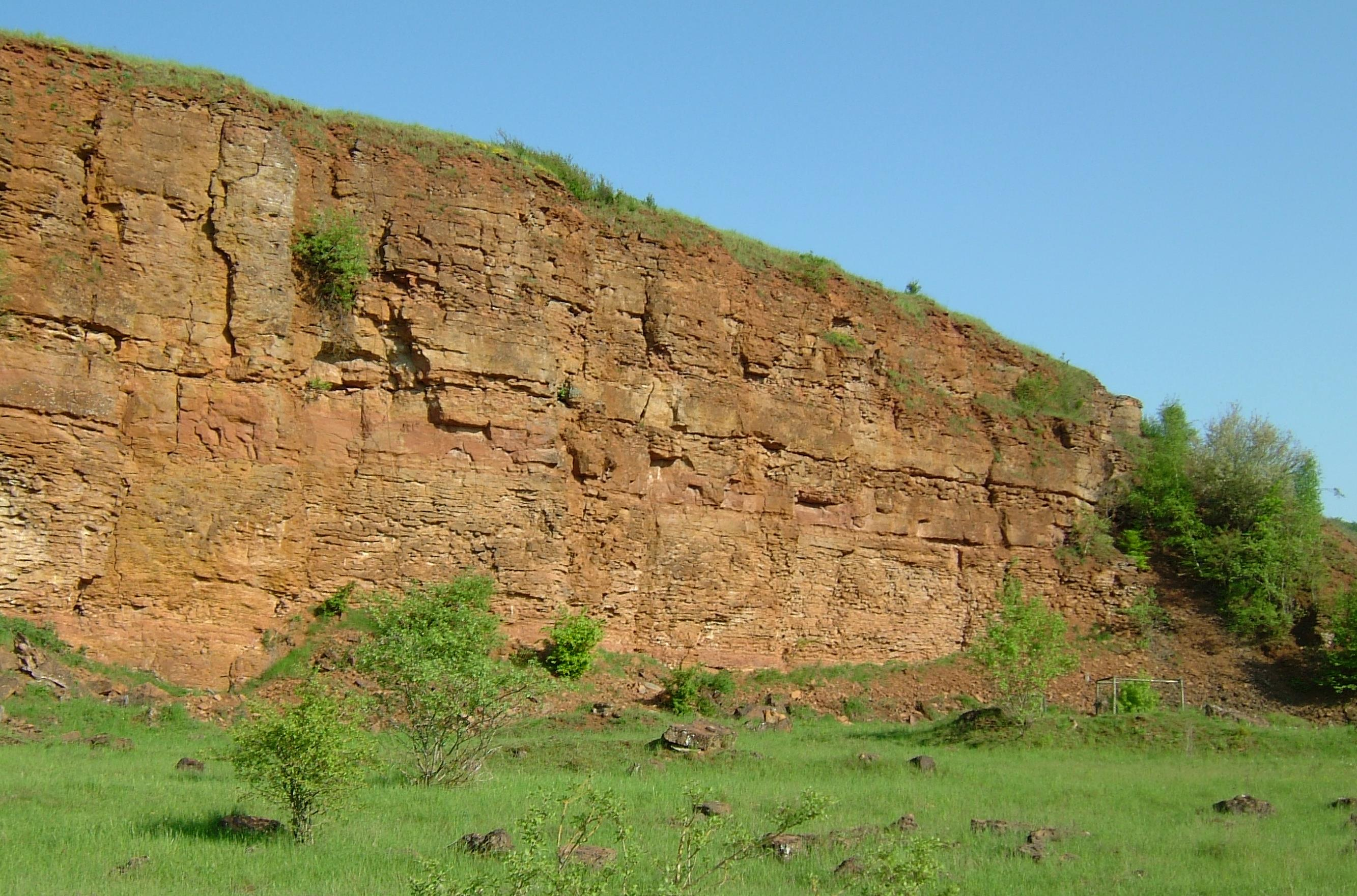 Stäilhang um Hesselsbierg